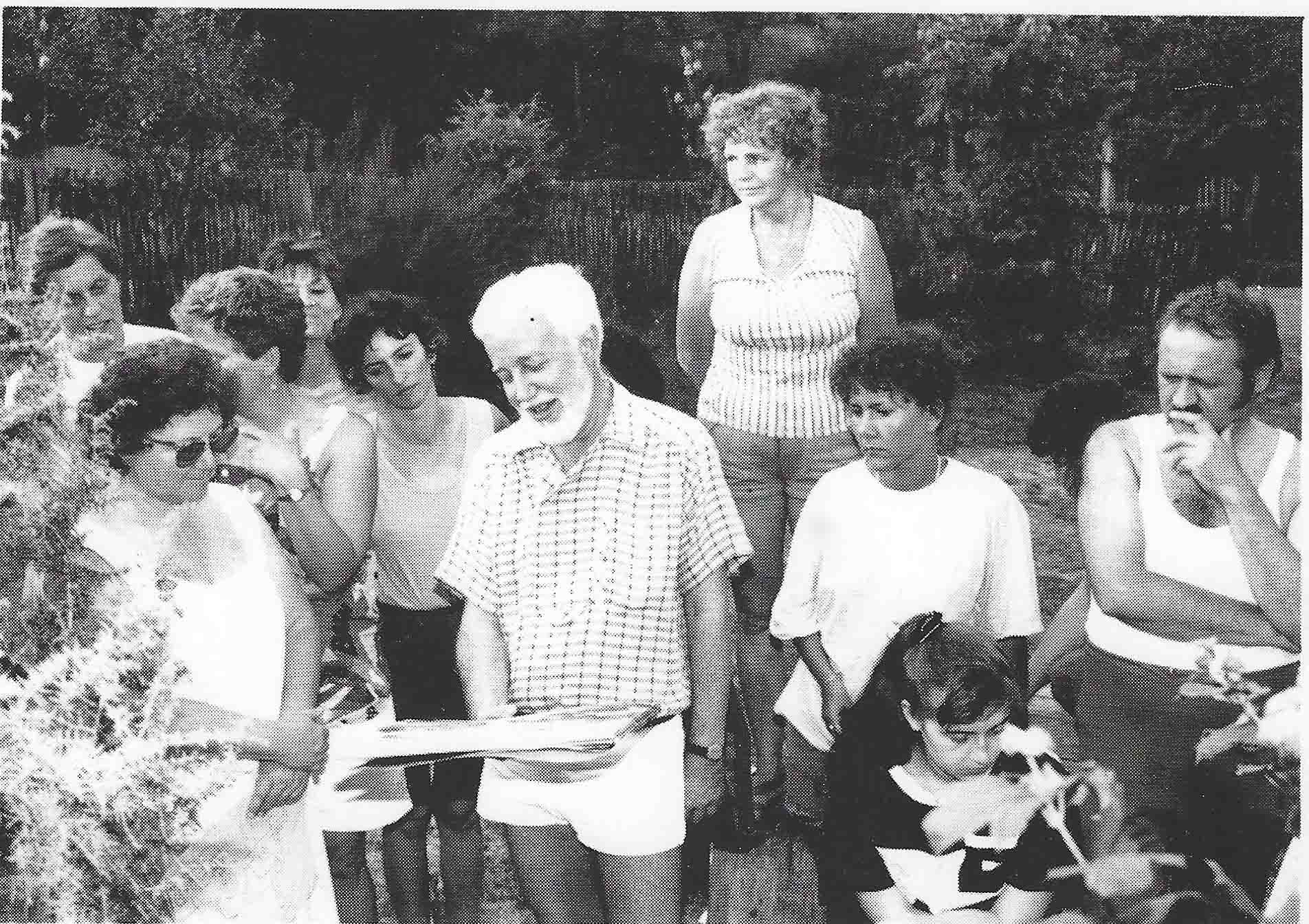 Buna Konstantin festőművész tanítványai körében az 1991-es gömörszőlösi nyári táborban